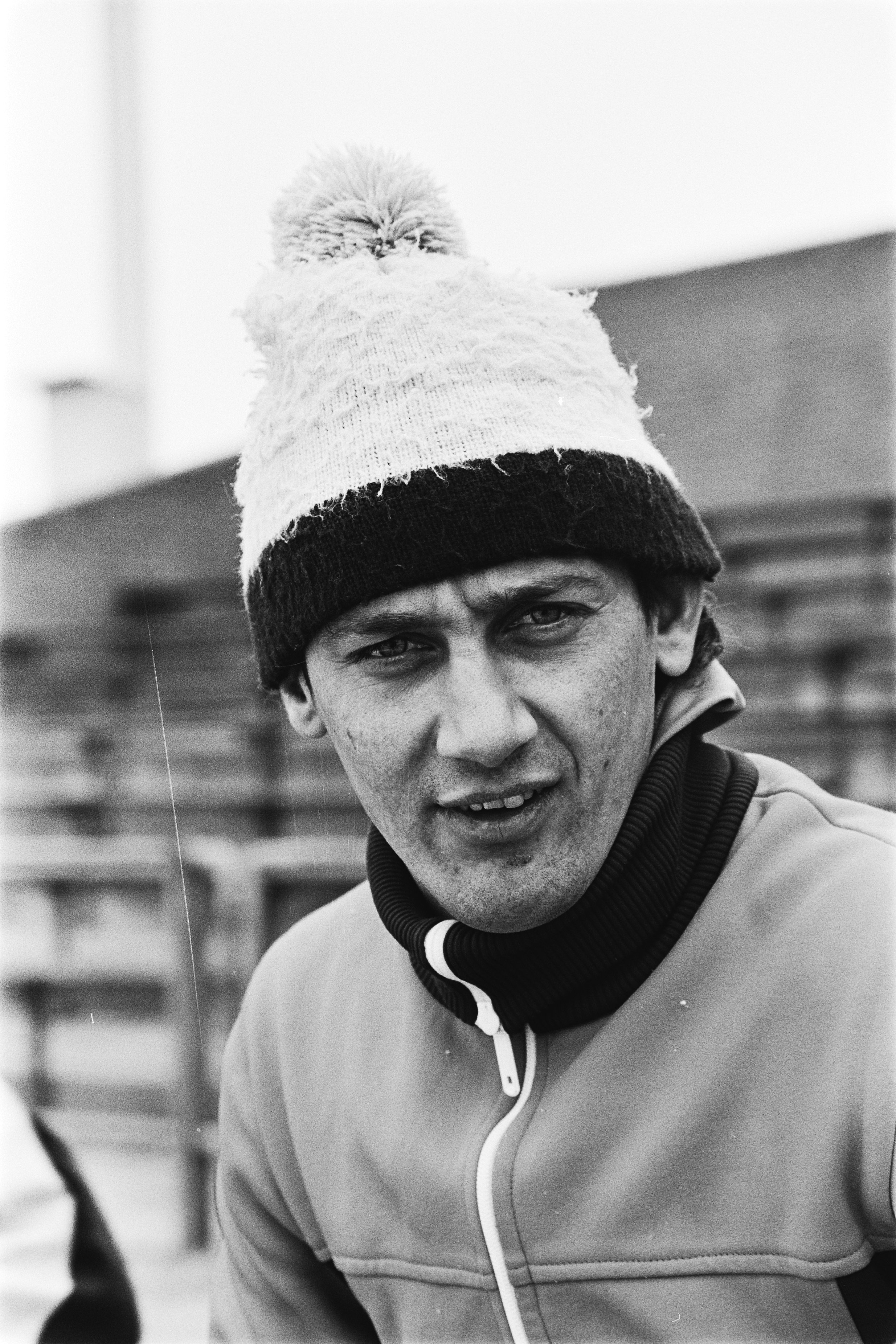 Collectie / Archief : Fotocollectie Anefo Reportage / Serie : [ onbekend ] Beschrijving : Wereldkampioenschappen schaatsen heren allround in Heerenveen. Sprinter Lieuwe de Boer neemt een kijkje tijdens de voorbereidende trainingen. Datum : 28 februari 1980 Locatie : Friesland, Heerenveen Trefwoorden : schaatsen, sport Persoonsnaam : Boer Lieuwe de Fotograaf : Dijk, Hans van / Anefo Auteursrechthebbende : Nationaal Archief Materiaalsoort : Negatief (zwart/wit) Nummer archiefinventaris : bekijk toegang 2.24.01.05 Bestanddeelnummer : 930-6936